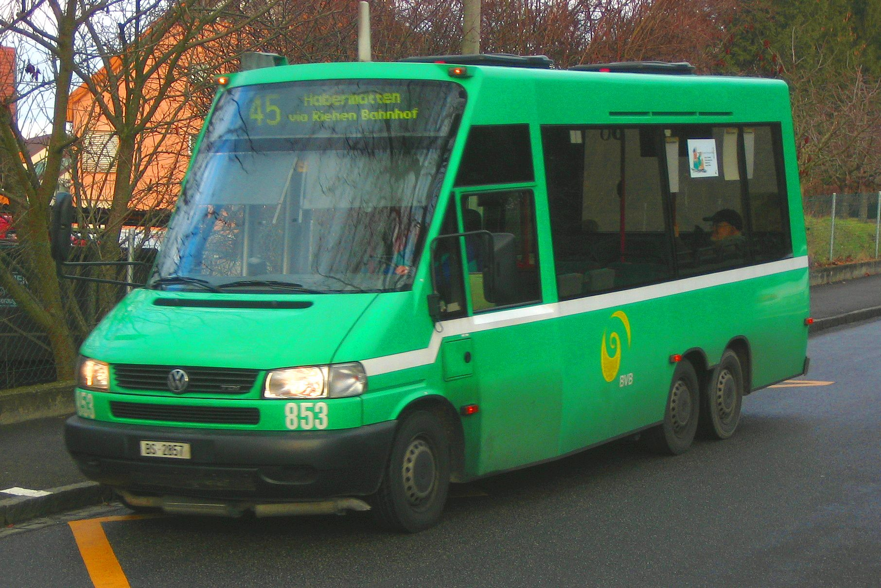 Ein "Büssli" bei der Haltestelle Dominikushaus in Riehen. Selbstgeschossen, Feb. 06